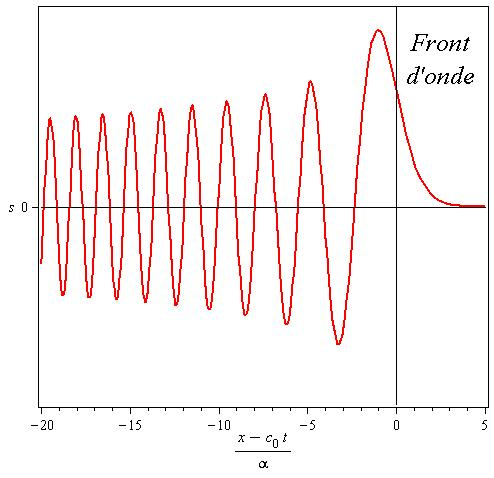 Onde de gravite (Airy)